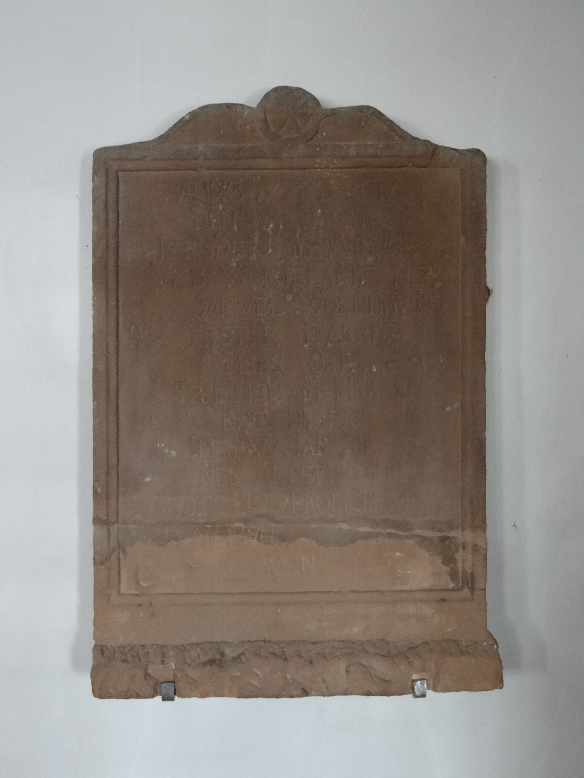 Evangelische Kirche Leihgestern